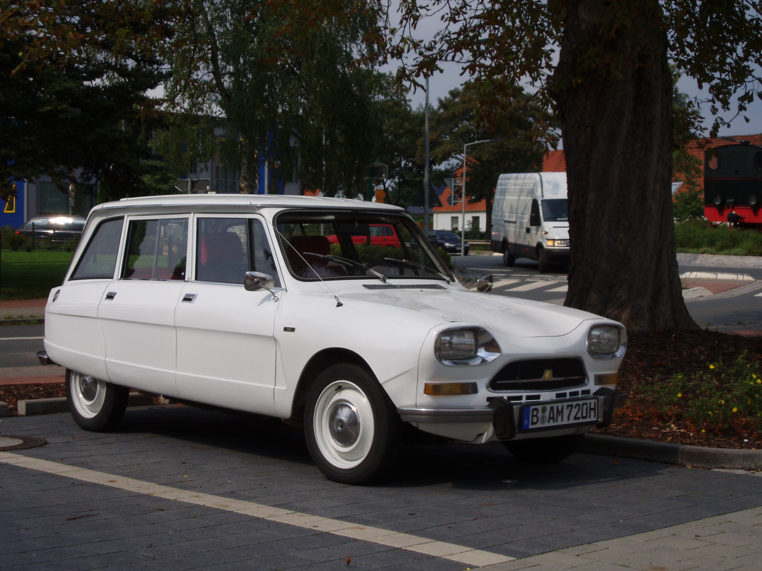 Citroen Ami Super Break